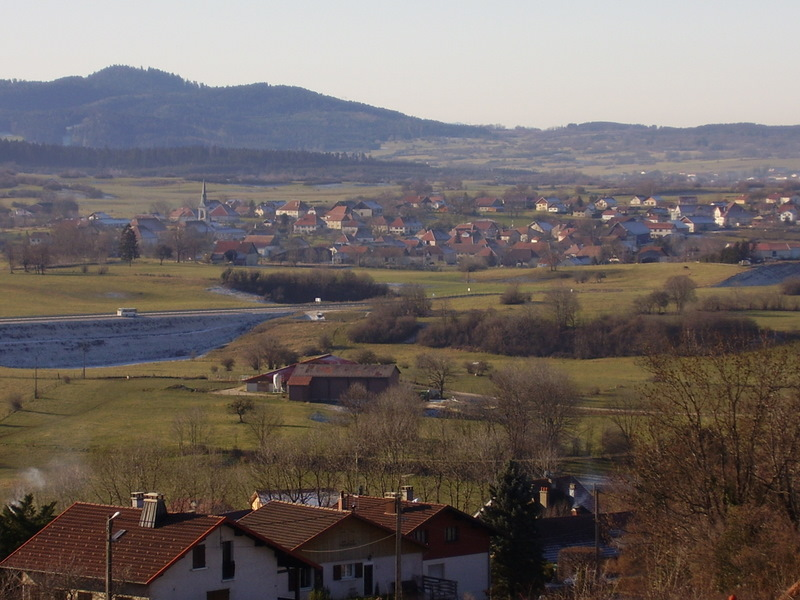 Vu de Flanchebouge, prise a Loray.